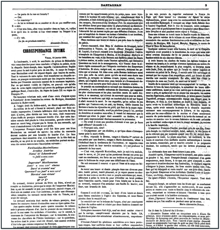 Фрагмент журнала "д'Артаньян", 1868г. с романом Мари Александрин Дюма "Интимный дневник"